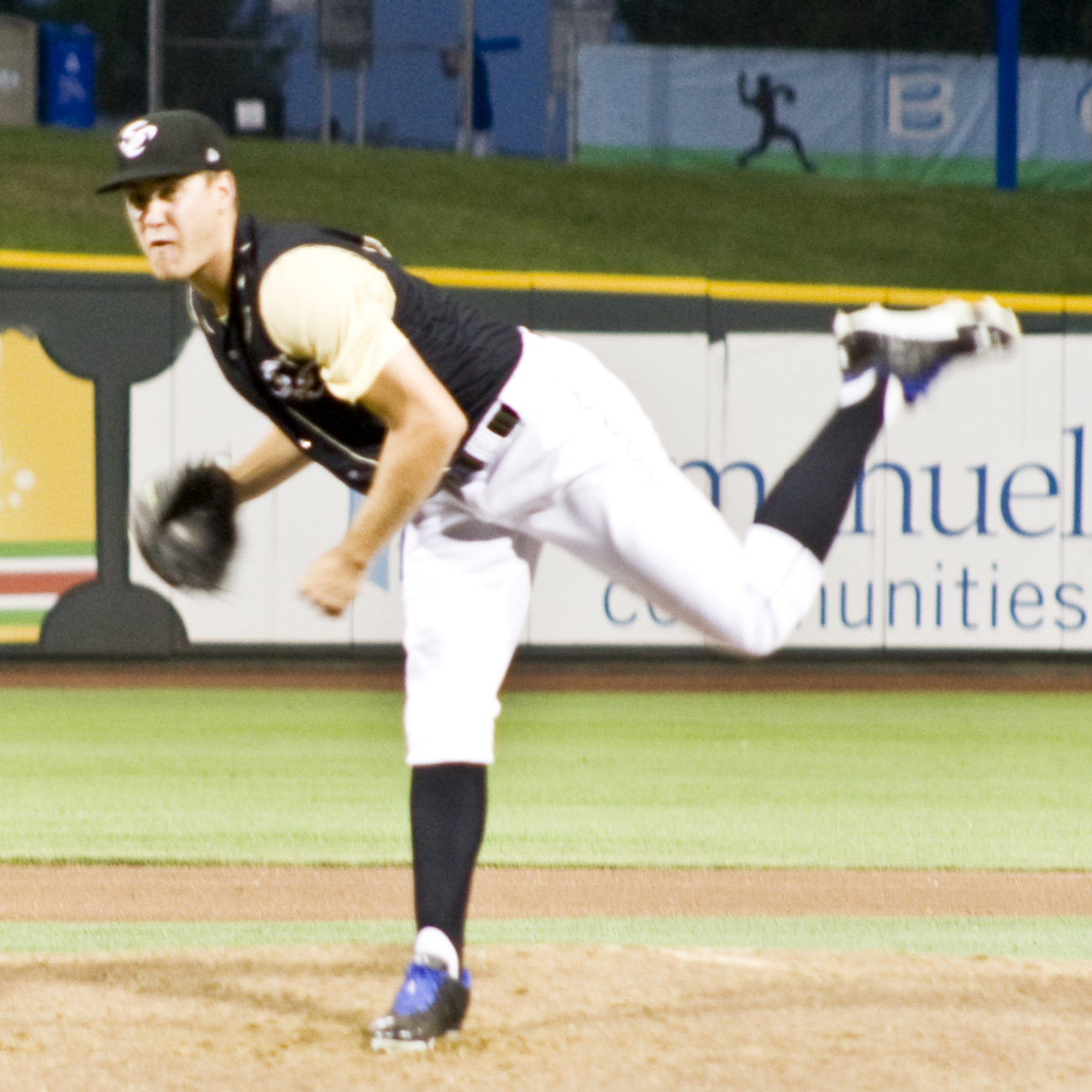 Justin Marks